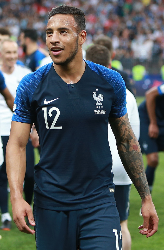 Франция - чемпион! Дождливая церемония награждения в «Лужниках»